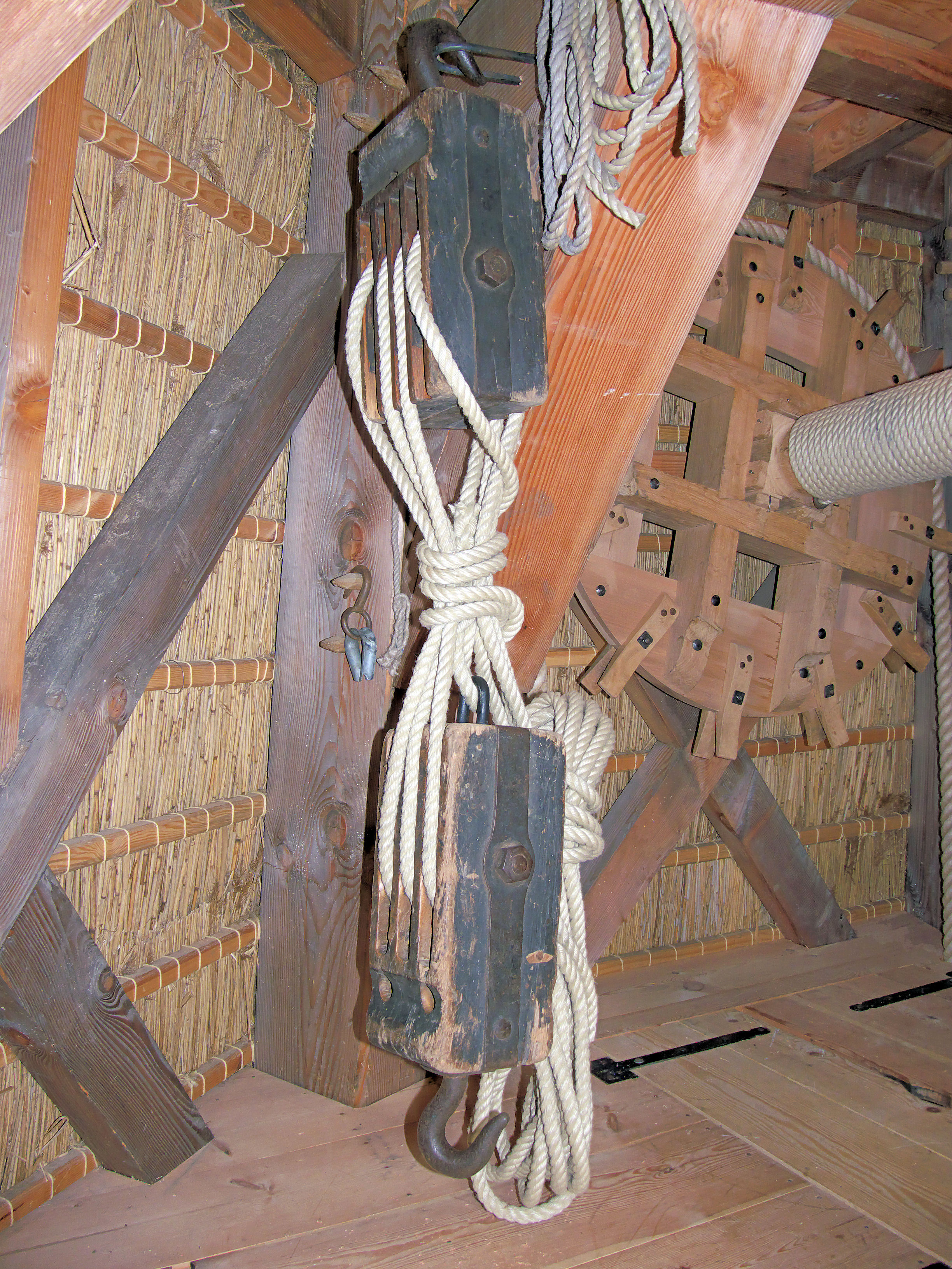 Molen De Hoop, Bunschoten, takelblok